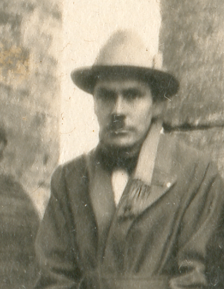 José Carlos Mariátegui con amigos peruanos, entre ellos Artemio Ocaña, a la espera de la elección de un nuevo, que sería Papa Pío XI, Vaticano, Roma, Febrero 1922. Puede usarse libremente bajo licencia CC mencionando en los créditos "Archivo José Carlos Maríategui, Lima, Peru (